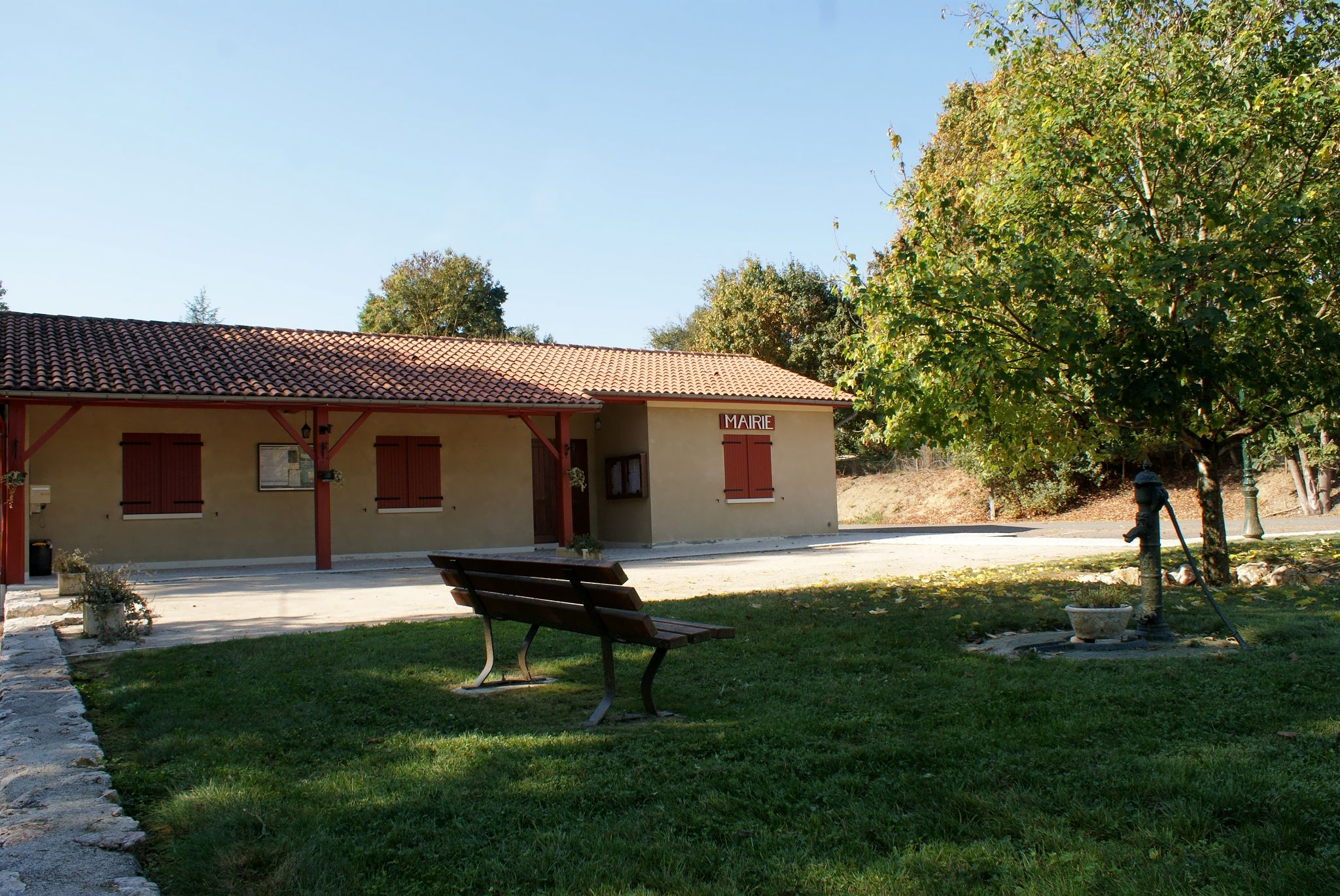 Het stadhuis van Sariac-Magnoac.